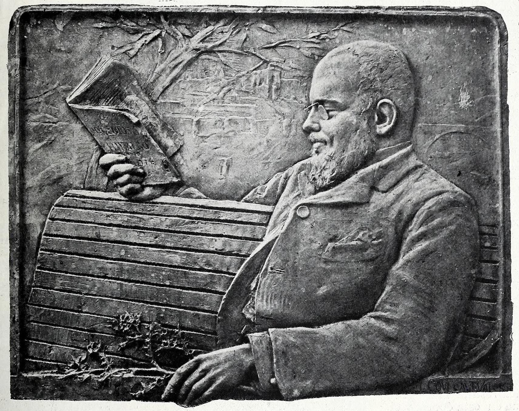 Francisco Navarro Ledesma.